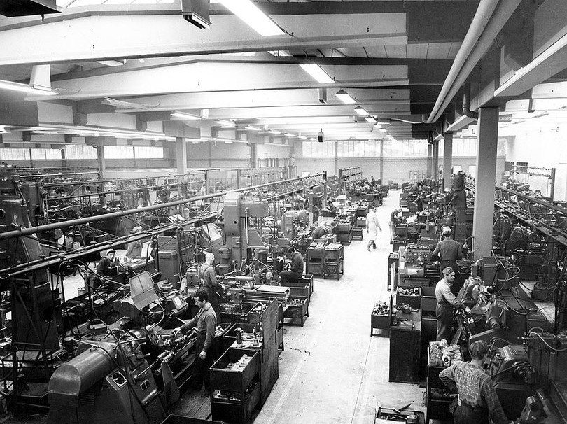 Atlas Copco, Sickla, Nacka. Interiör från Siroccoverkstaden, som togs i bruk 1961. Tillverkning av delar till bergborrmaskiner. Fotot publicerat i Nackaboken 1966. Byggnadens arkitekt var Karl G.H. Karlsson.